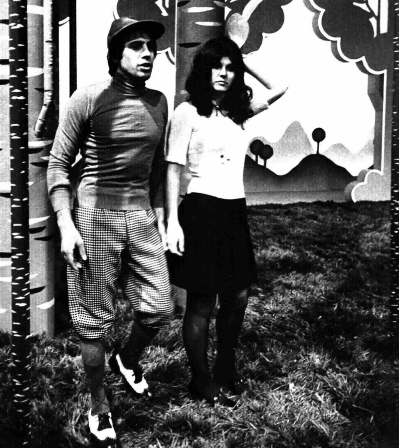 Italian singers Adriano Celentano and Claudia Mori